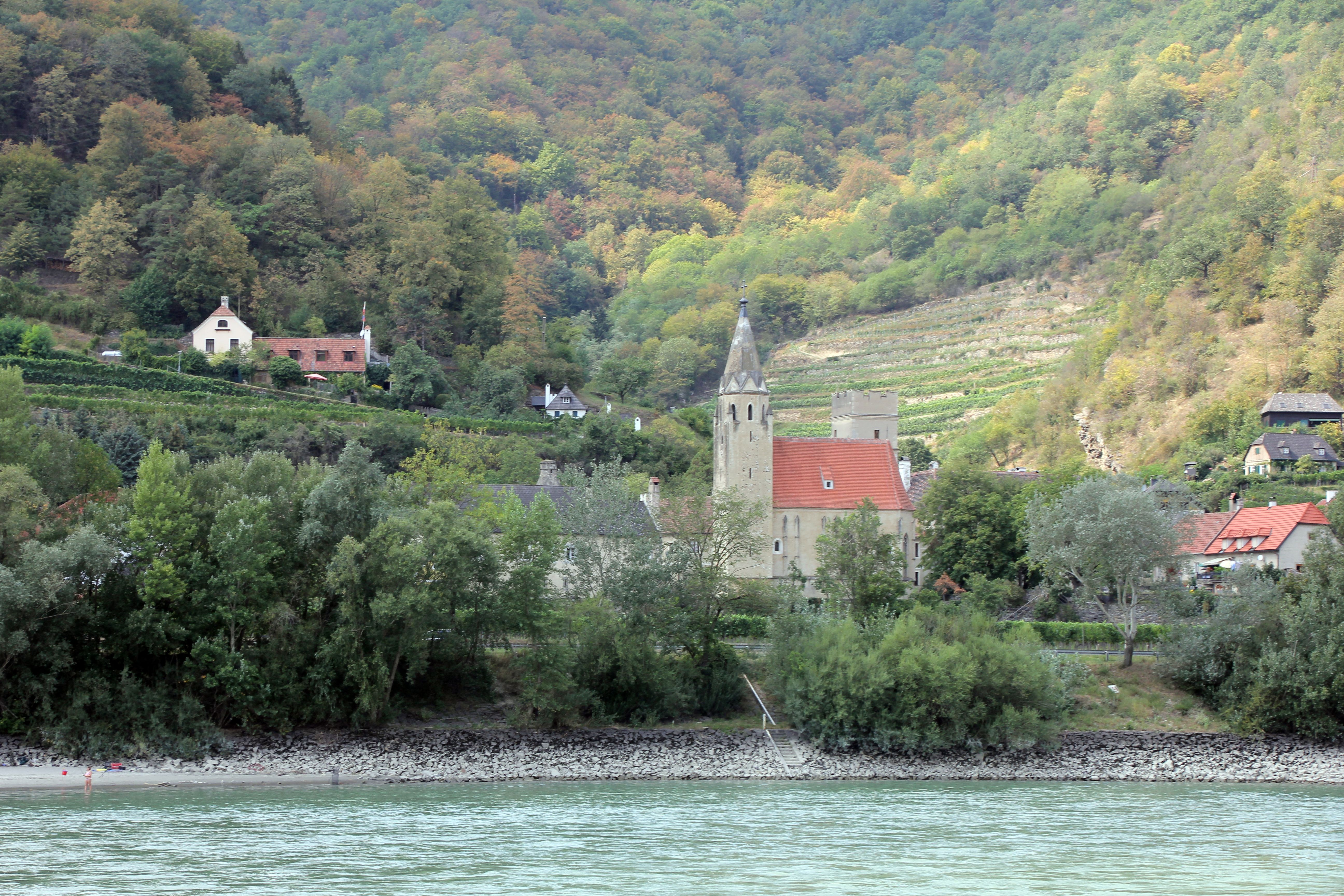 Eindrücke bei einer Schifffahrt durch die Wachau